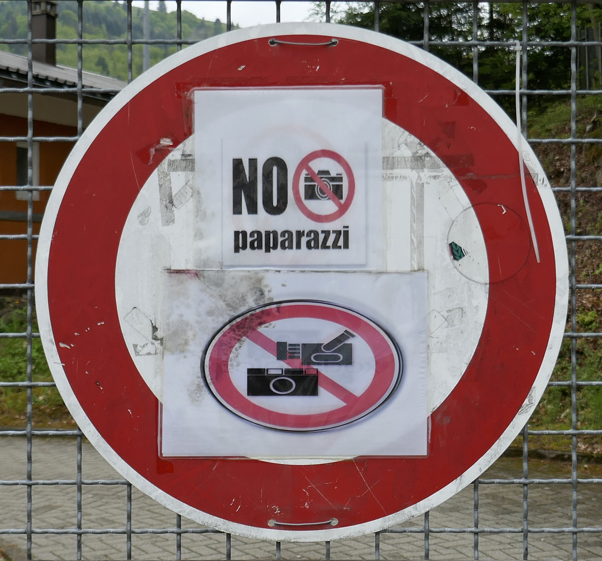 Jogi-Löw-Stadion, FC Schönau 08, Schönau im Schwarzwald.